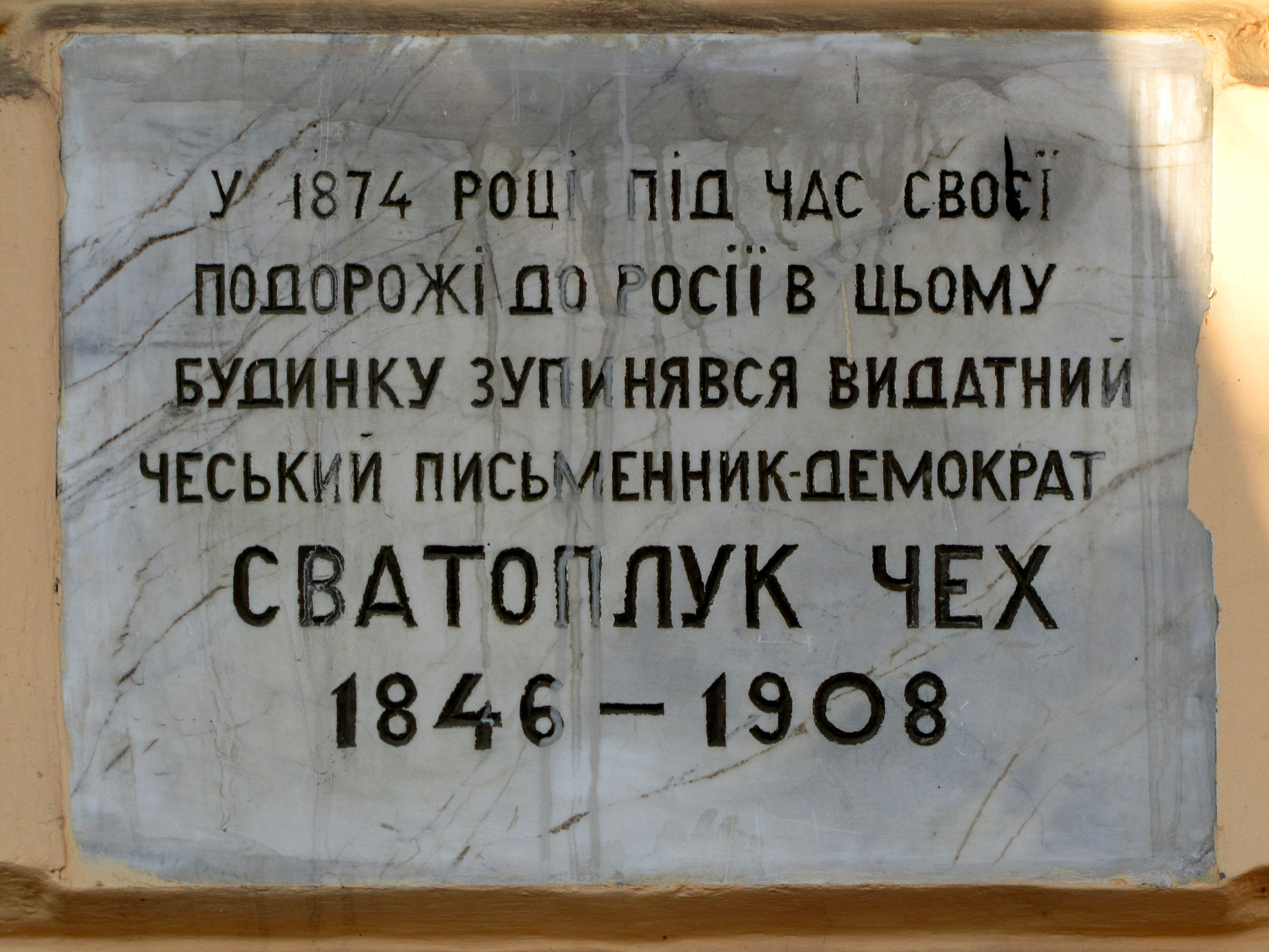 Pamětní deska na domě č. 4 u pravoslavné katedrály v Oděse, kde v roce 1874 bydlel Svatopluk Čech. Text v ukrajinštině: "У 1874 році під час своєї подорожї до Росії в цьому будинку зупинявся видатний чеський письменник-демократ Сватоплук Чех 1846–1908" Volný překlad: "V roce 1874 při své cestě do Ruska bydlel v tomto domě slavný český spisovatel-demokrat Svatopluk Čech, 1846–1908"